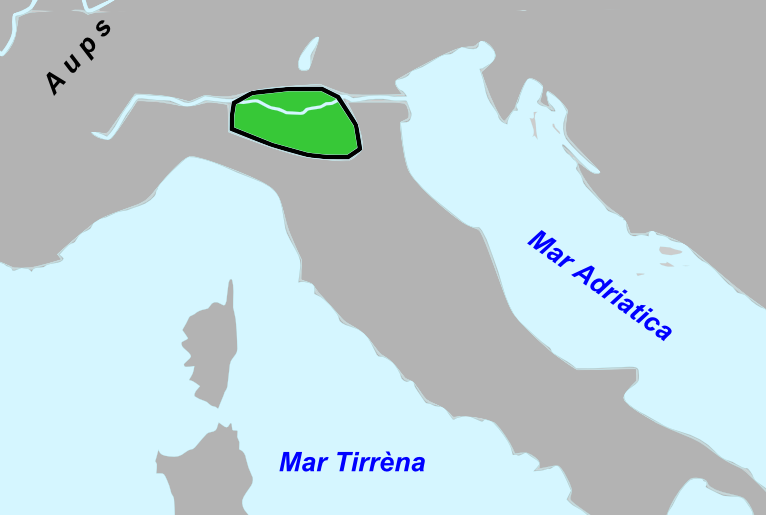 Extension de la cultura dei Terramare.